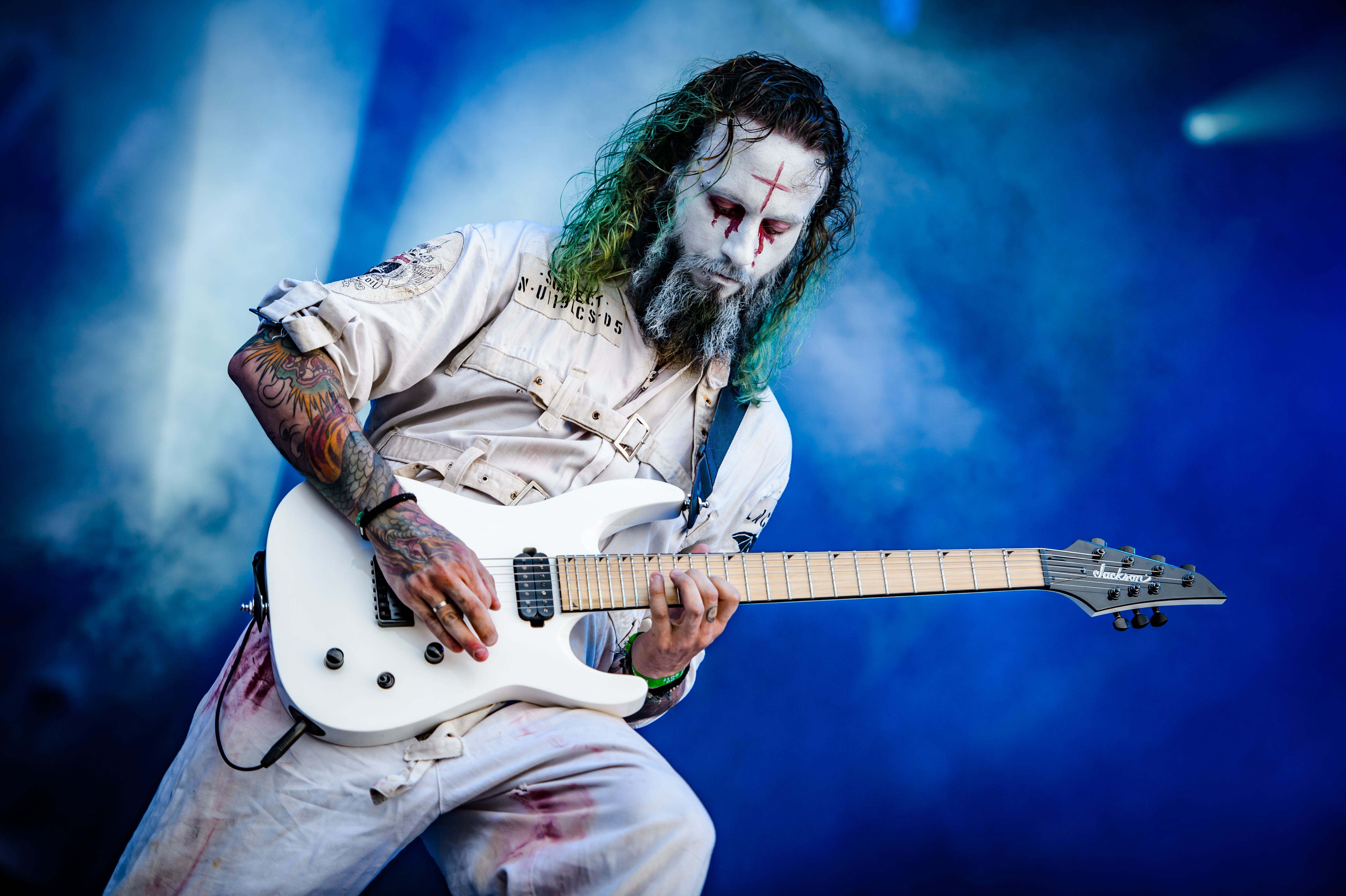 'RockHarz Open Air 2017; Ballenstedt': 'Lacuna Coil'